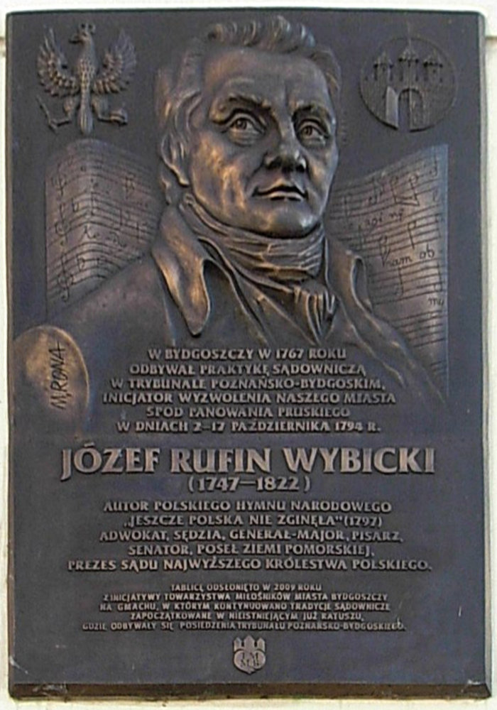 Tablica pamiątkowa Józefa Wybickiego na ścianie budynku Wojewódzkiej i Miejskiej Biblioteki Publicznej na Starym Rynku w Bydgoszczy